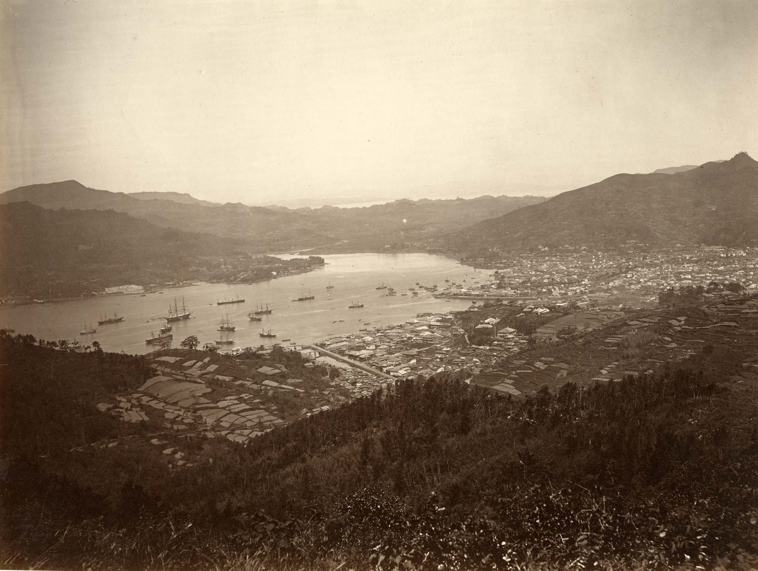 Ueno Hikoma (připsáno), Pohled na Nagasaki z výšin Nabekanmurijama (počátek 70. let 19. století). Albuminový papír se zlatým tónováním Photo: archive of the Moravian Gallery in Brno